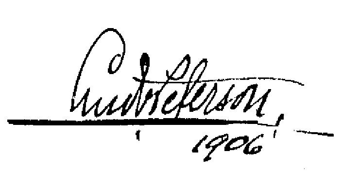 Ludwig Petersons namnteckning på en arkitektritning